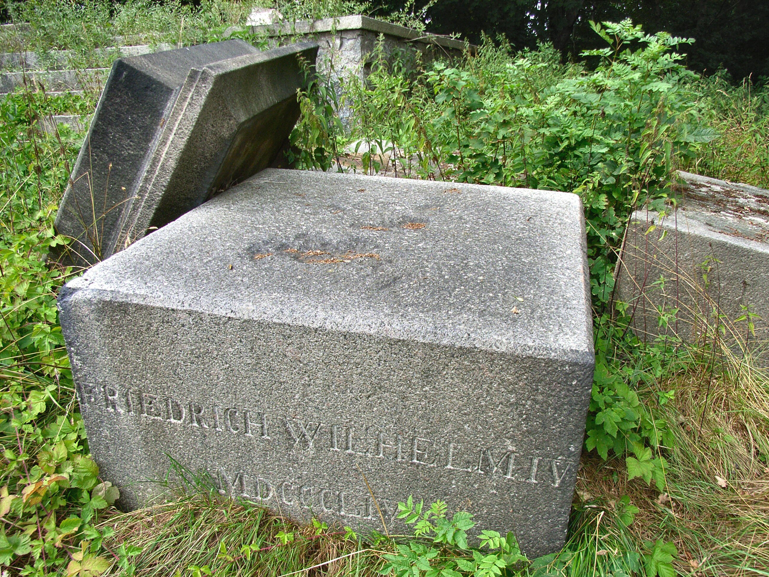 Teile des Postaments der Preußensäule von 1854 bei Neukamp auf der Insel Rügen im August 2006